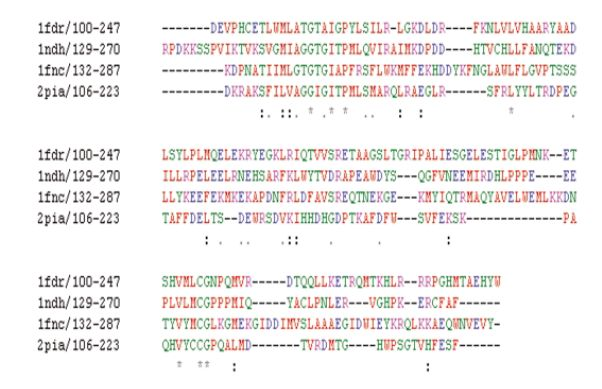 Multiple alignment čtyř oxidoreduktáz, proteinové sekvence NAD vázajících domén.